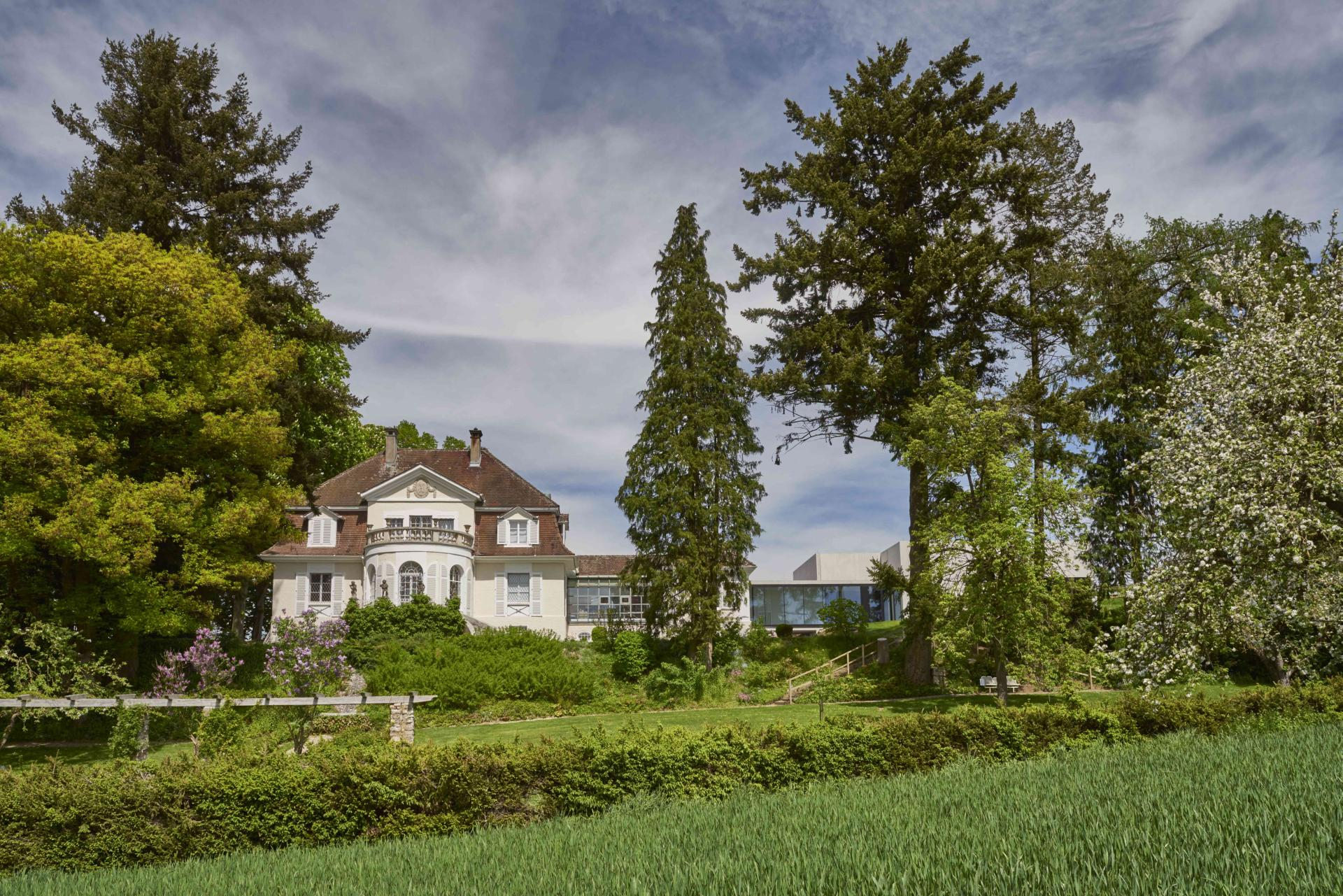 Villa von Süden gesehen